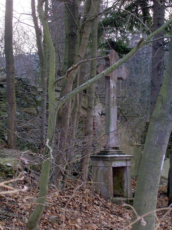 Ruiny kaplicy w Rogóżce (gmina Stronie Śląskie, Dolny Śląsk